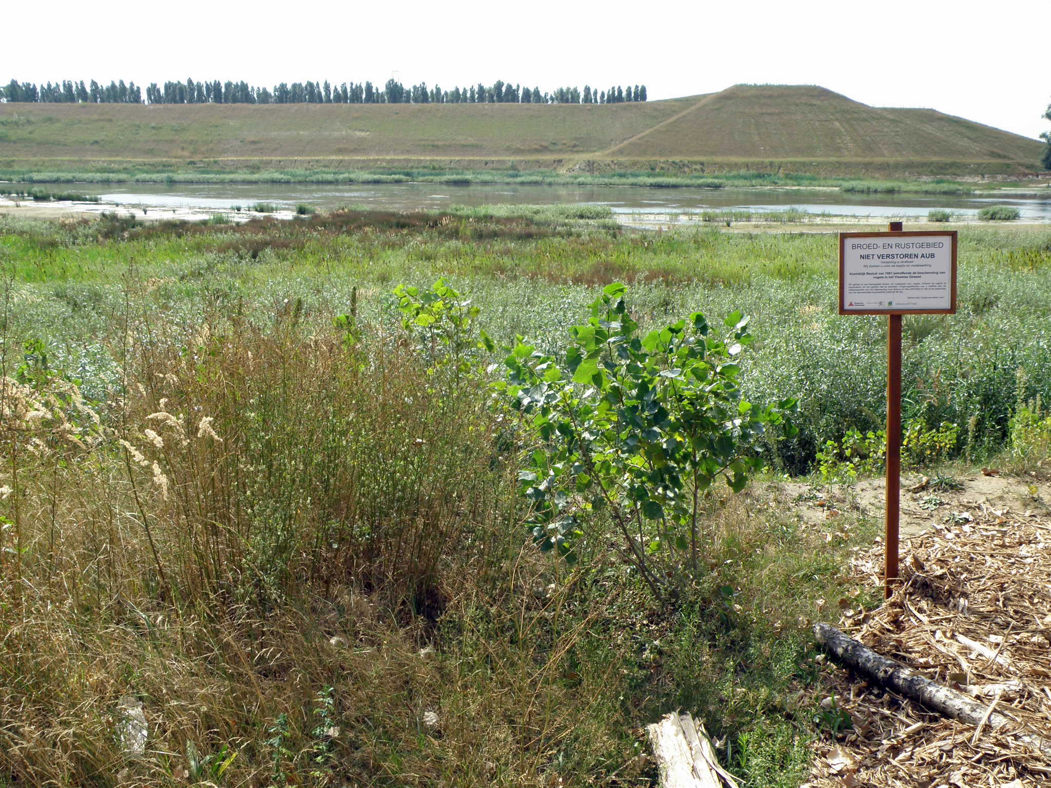 Berendrecht, stad Antwerpen (district Berendrecht-Zandvliet-Lillo) : natuurgebied Reigersbos. Achter de aarden wal op de achtergrond ligt het Delwaidedok.